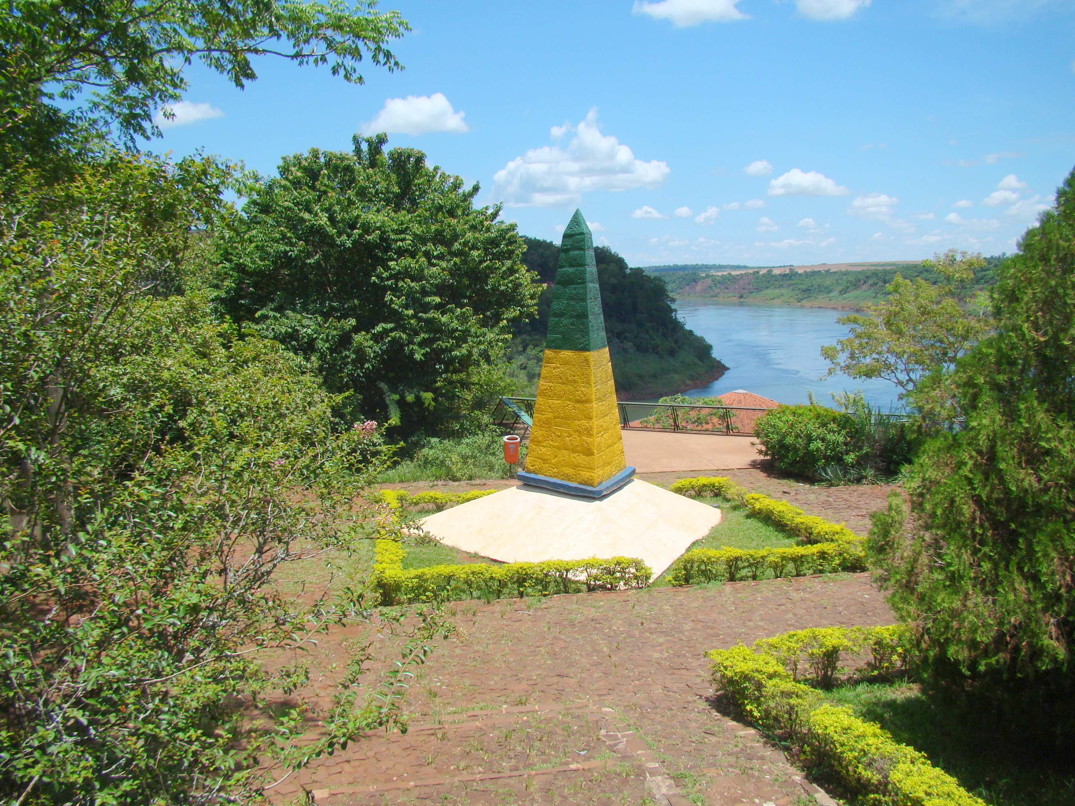 Marco brasileiro da Tríplice Fronteira entre o Brasil, a Argentina (esquerda) e o Paraguai (direita) em Foz do Iguaçu, Paraná, Sul do Brasil.